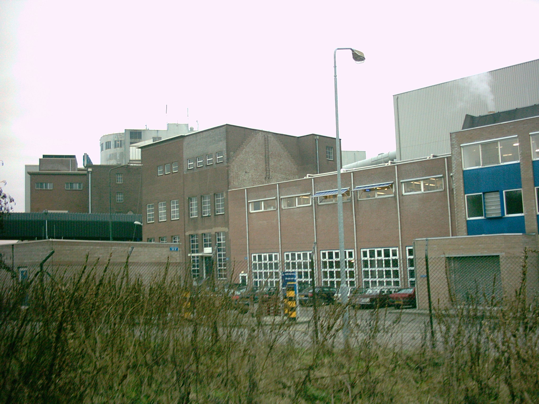 Oude gedeelte bierbrouwerij Bavaria. 4 jan 2006.